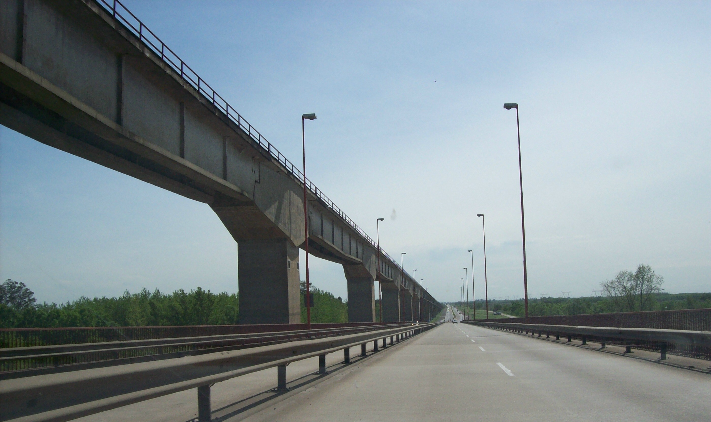 Mitre Bridge over Paraná de las Palmas river